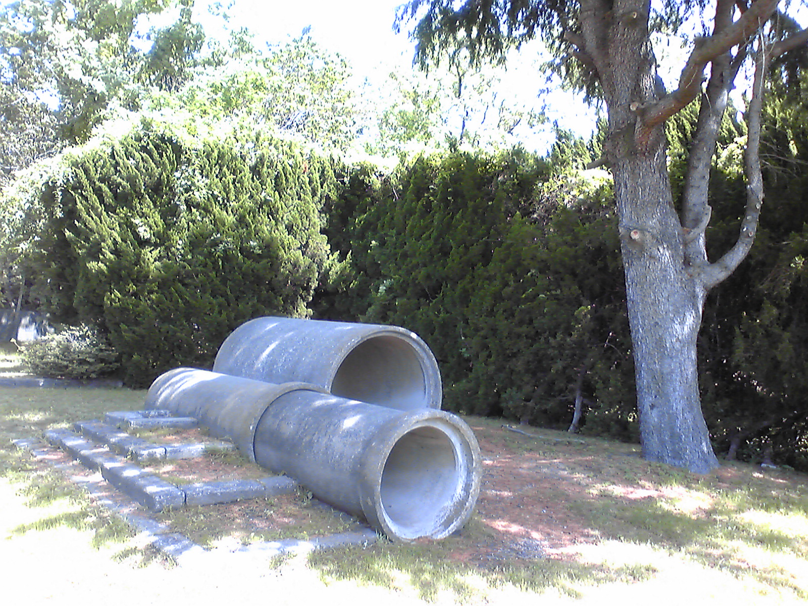 みすみ幼稚園跡地